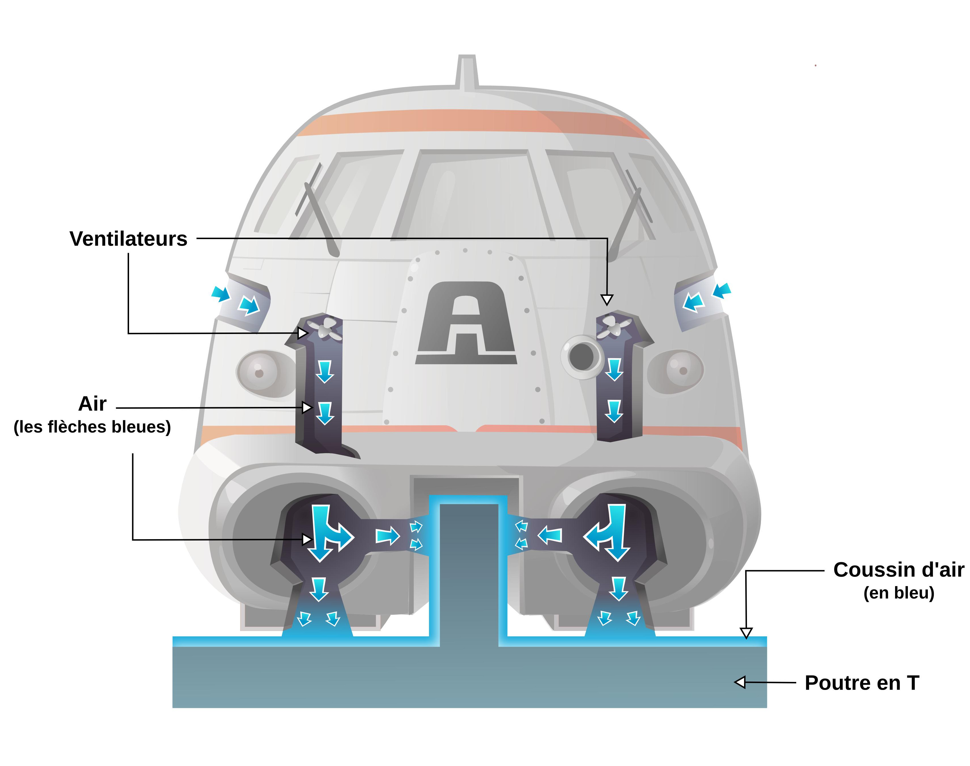 Schéma de sustentation légendé de l'aérotrain.